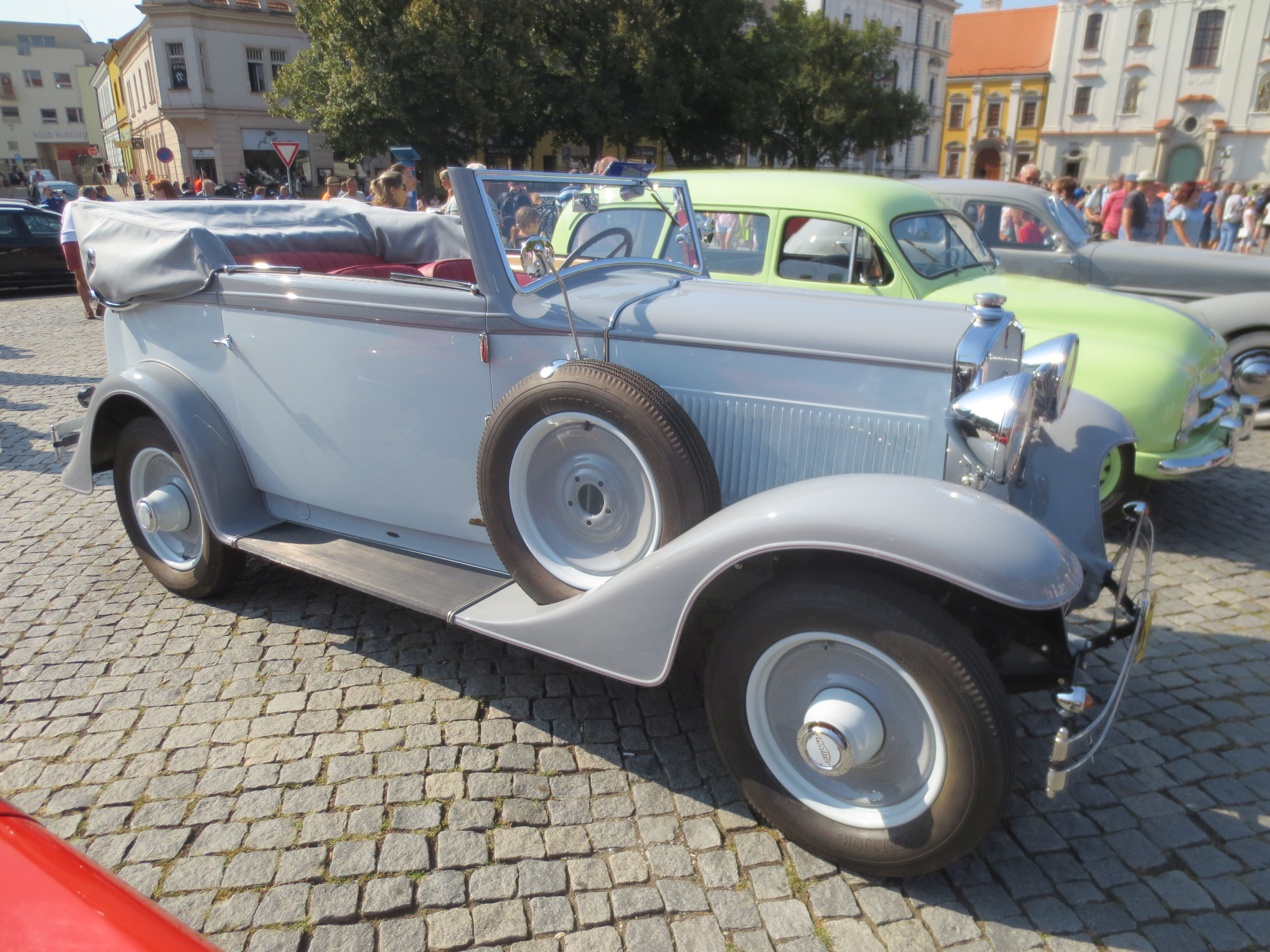 Walter Princ (1933) kabriolet Petera